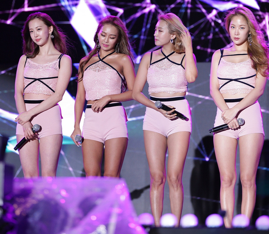 씨스타(SISTAR) G페스티벌 아시아 드림 콘서트